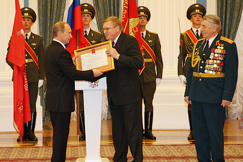 МОСКВА, КРЕМЛЬ. На церемонии вручения грамоты о присвоении Луге почётного звания «Город воинской славы».